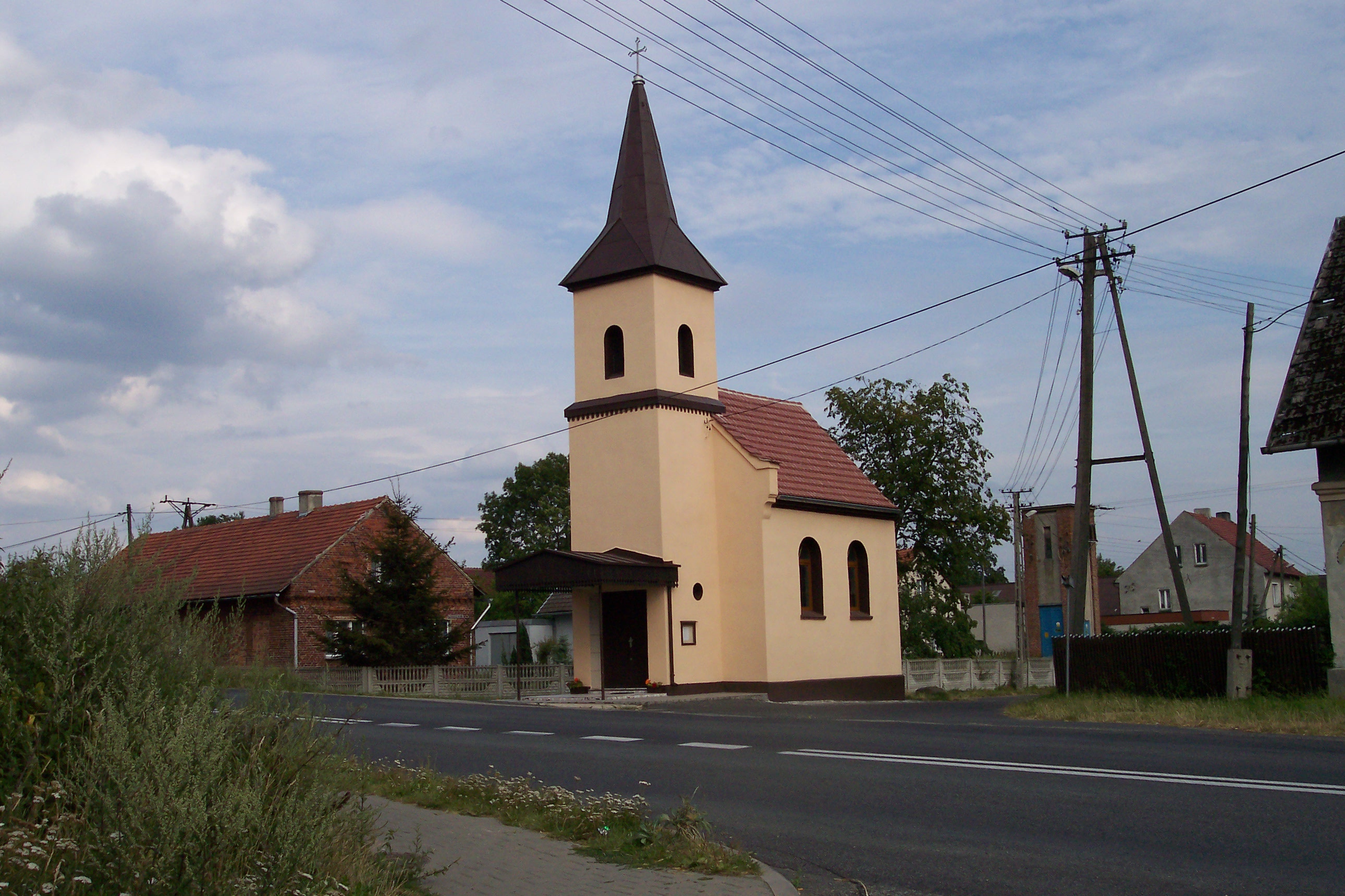 Kapliczka w Łanach Małych